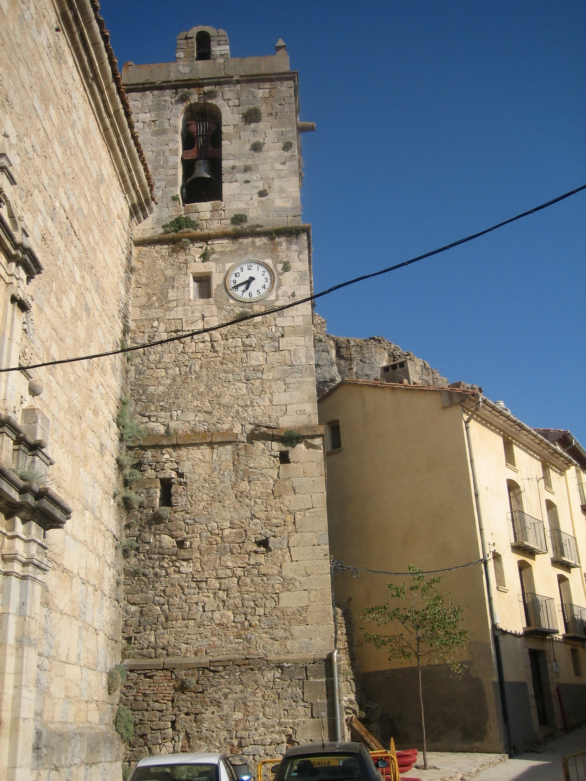 Torre-campanar de l'església de l'Asssumpció de'Ares del Maestrat (Alt Maestrat)